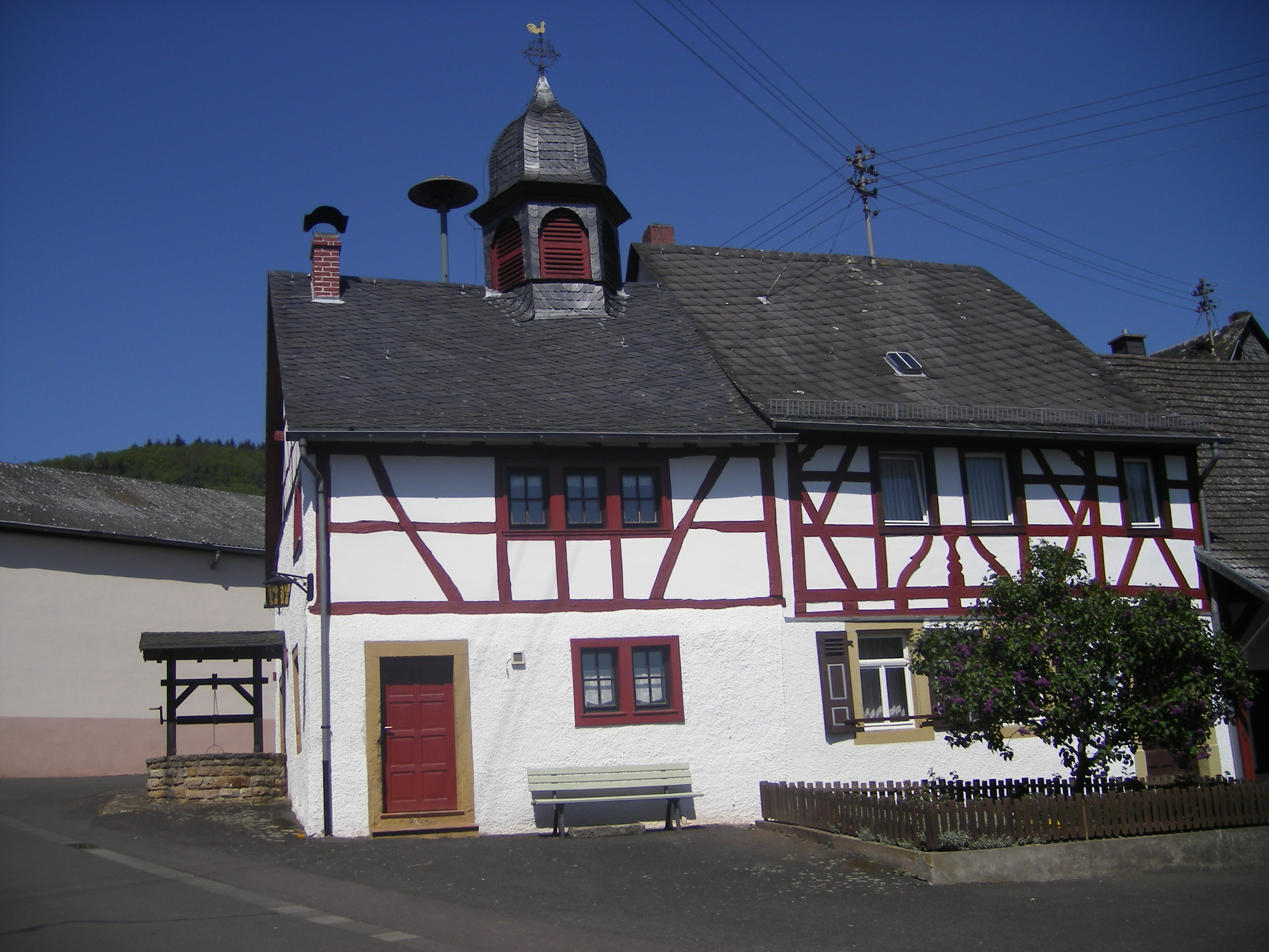 "Alte Schule" (Old school) in Heimweiler, Rhineland-Palatinate